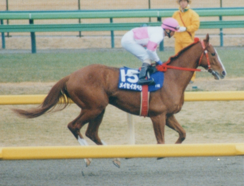 Meisei Opera (horse)